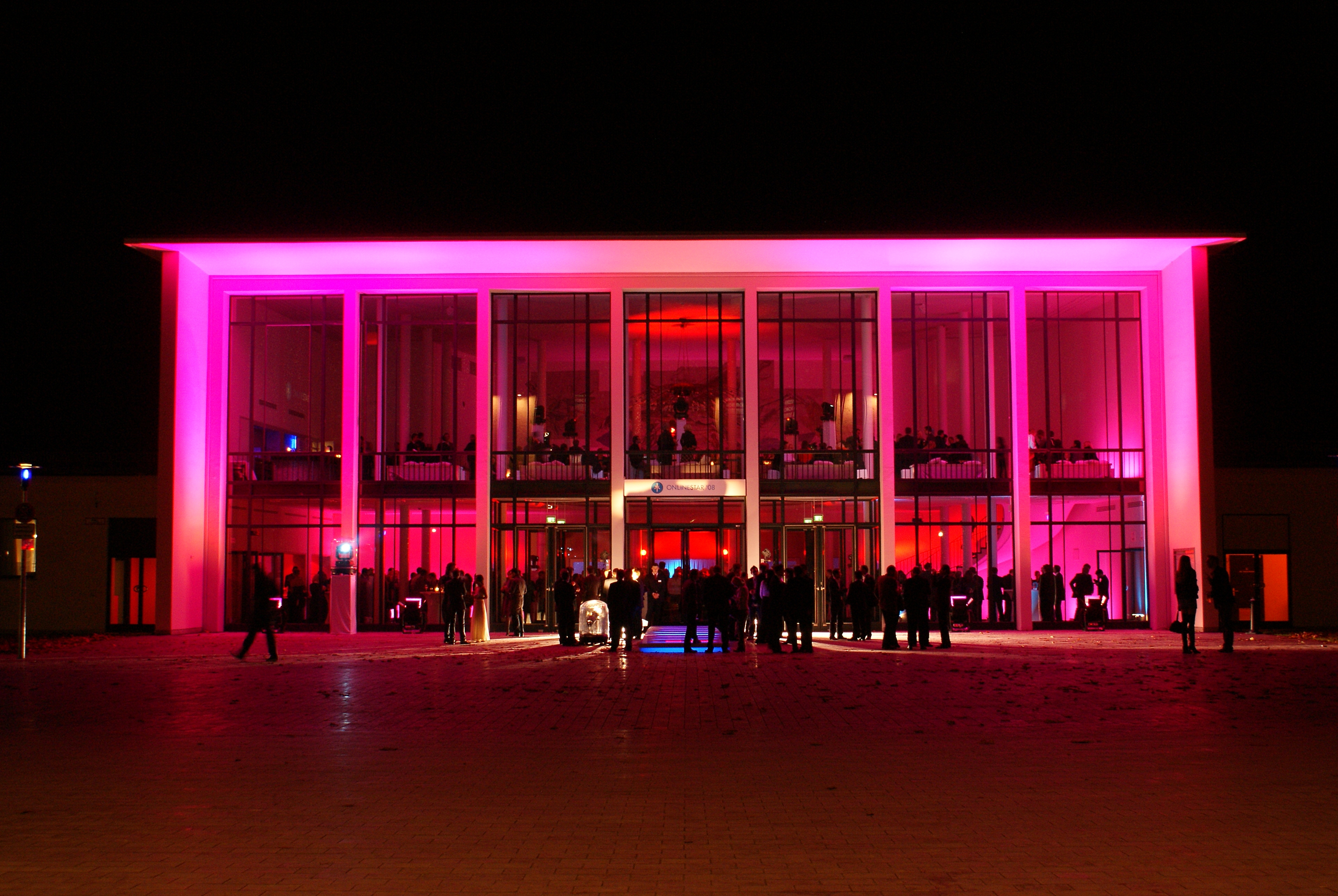 Alte Kongresshalle auf der Theresienhöhe in München während der Verleihung des Onlinestar 2008